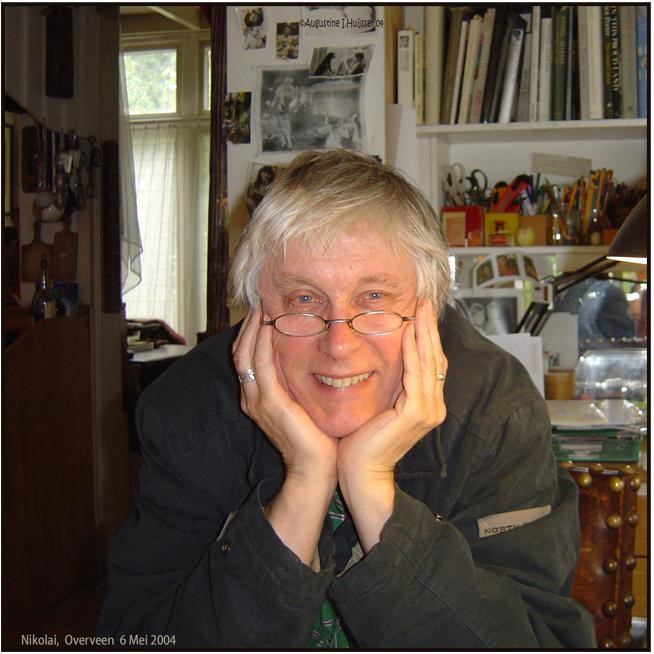 Overveen, 6 mei 2004